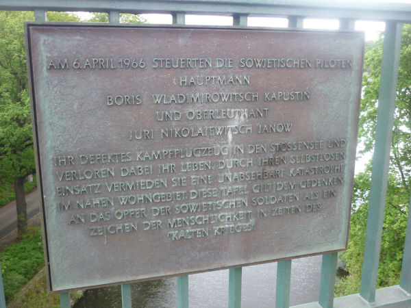 Gedenktafel im Geländer der Stößenseebrücke